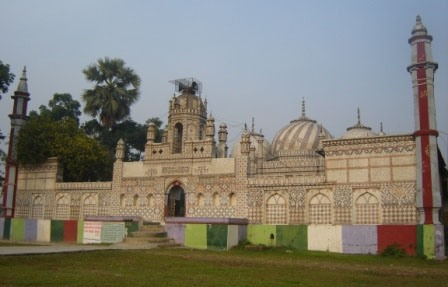 Bazra Shahi Maszid at Noakhali Distric Bangladesh